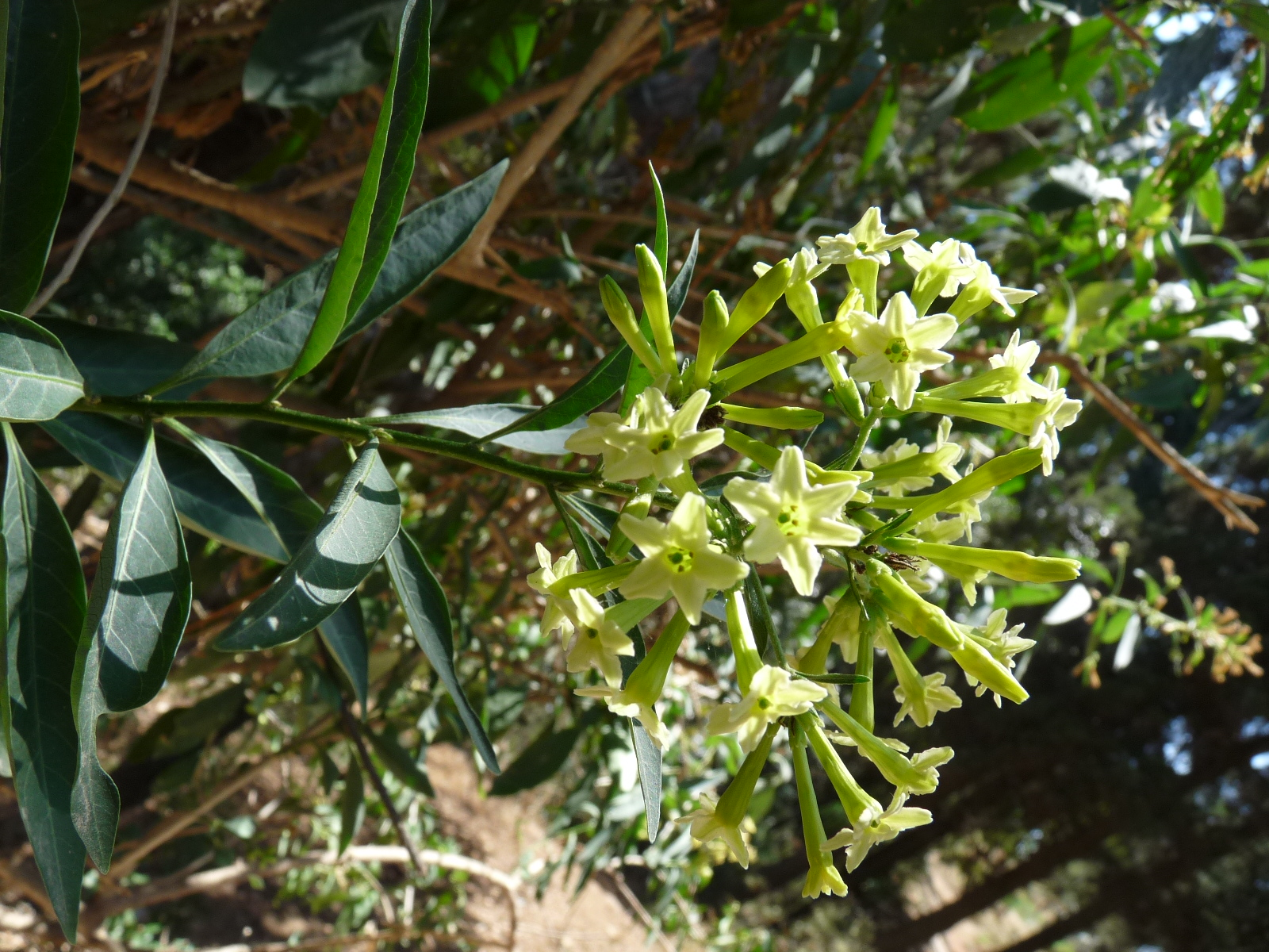 Flor d'un exemplar de Cestrum parqui al parc del Guinardó